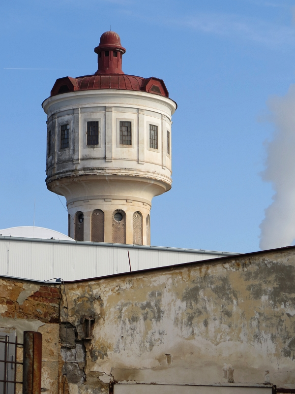 Věžový vodojem, U Keramičky, st. 183, Chlumčany (okres Plzeň-jih).